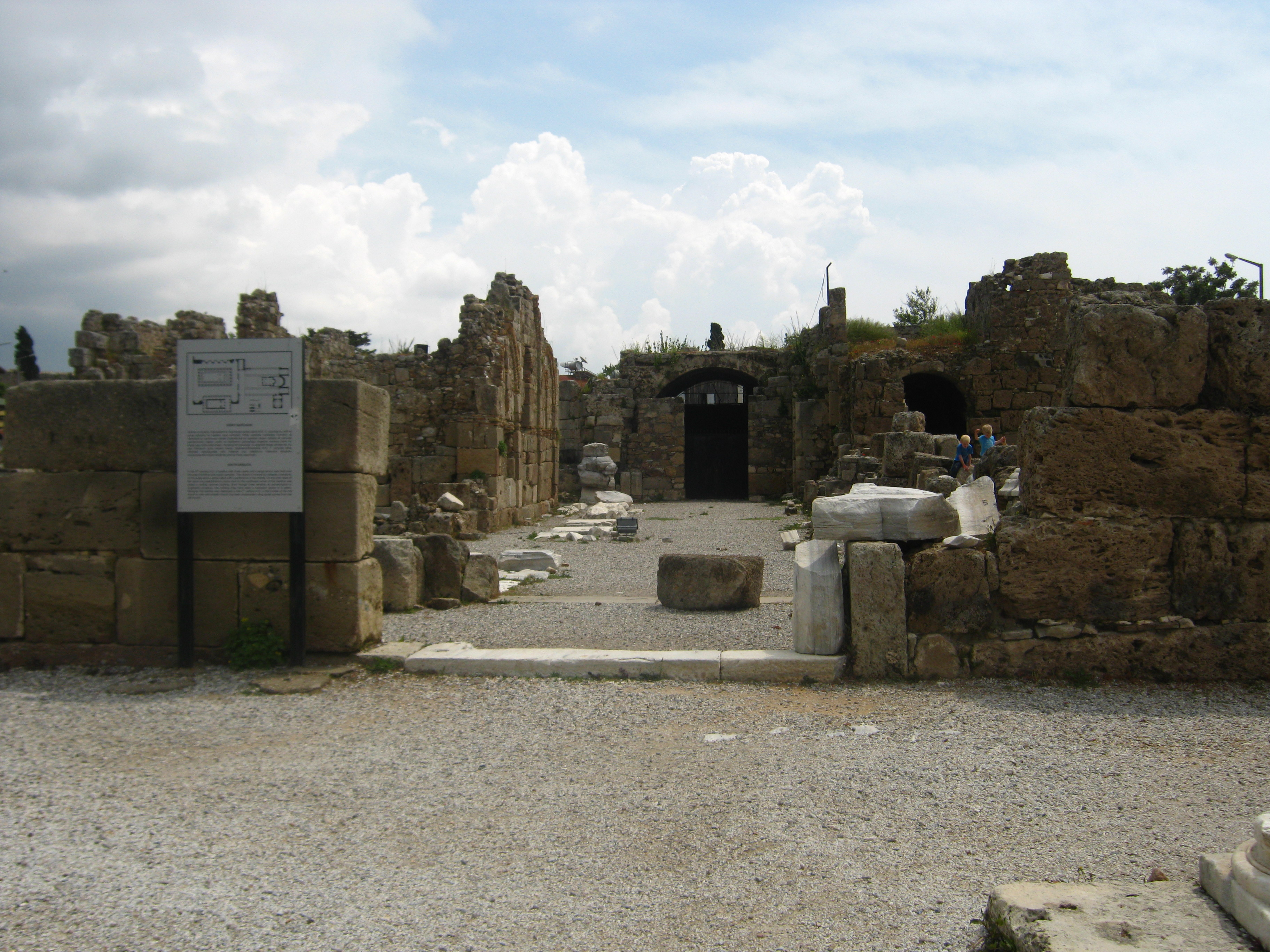 Загальний вигляд лівої нави "Південної базиліки"